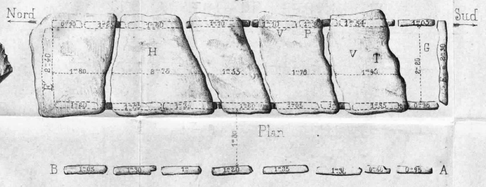 Allée couverte de Kerbannalec (Kerbalannec). Plan des fouilles, en 1880, par Paul du Chatellier